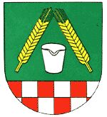 Wappen der Gemeinde Abentheuer